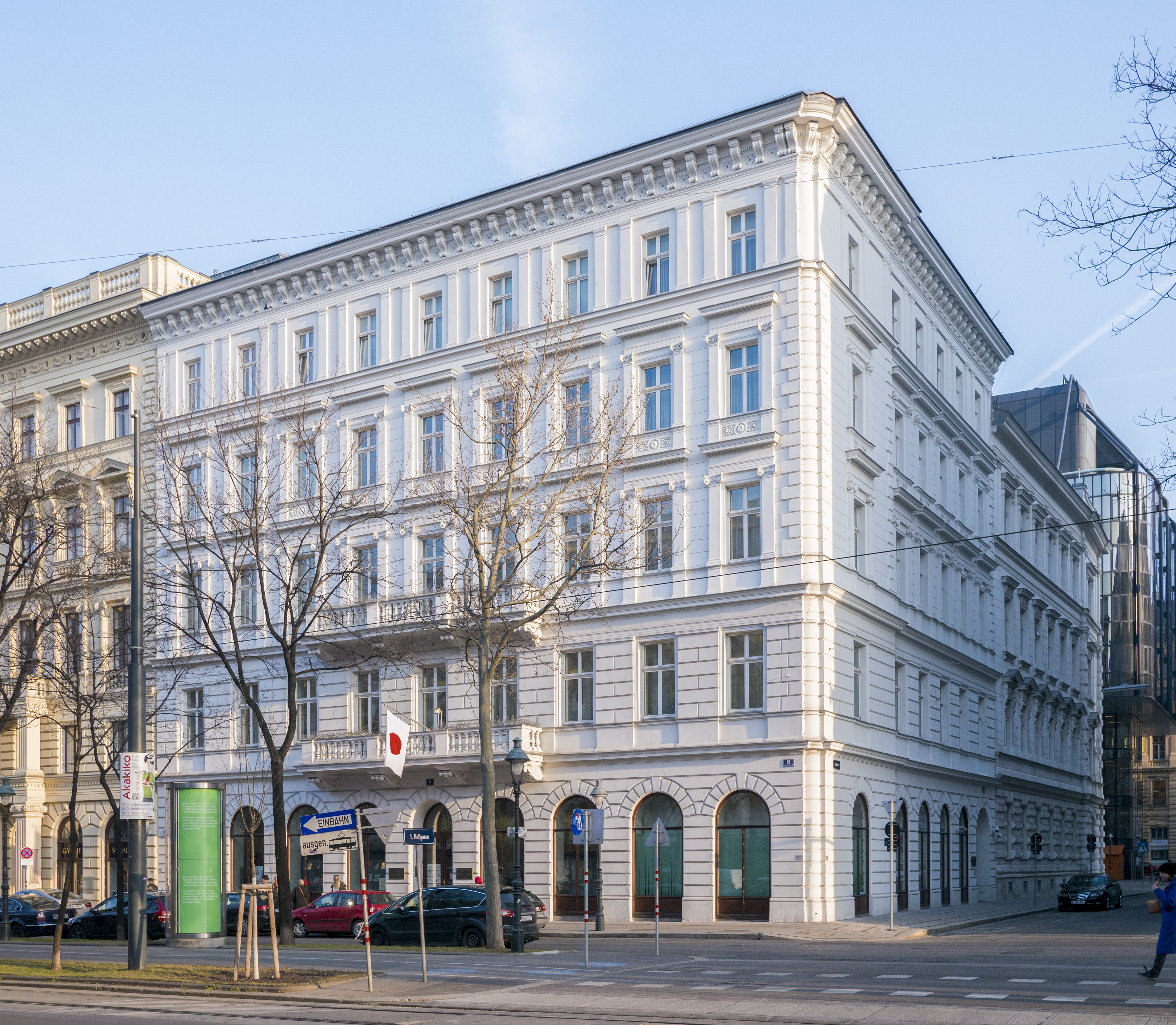 Wohn- und Geschäftshaus